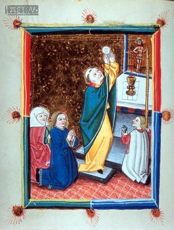 Messdarstellung Wien um 1470, mit Wandlungskerze als um einen Stab gewickelter Wachsstock.